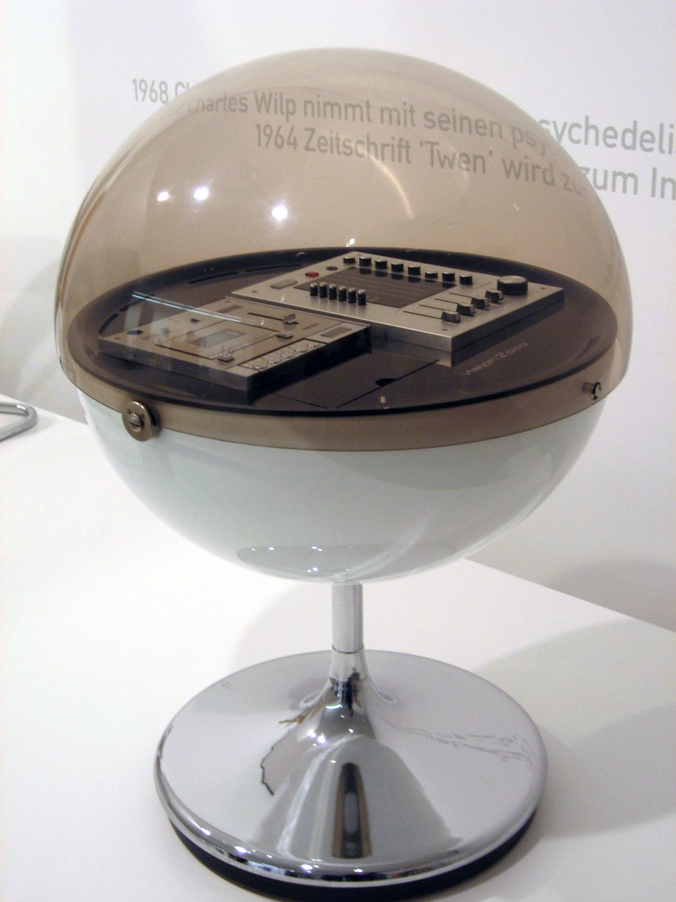 Stereoanlage Vision 2000, 1971, Pinakothek der Moderne, München Hersteller: Rosita Tonmöbel, Deutschland Thilo Oerke geb. 1940